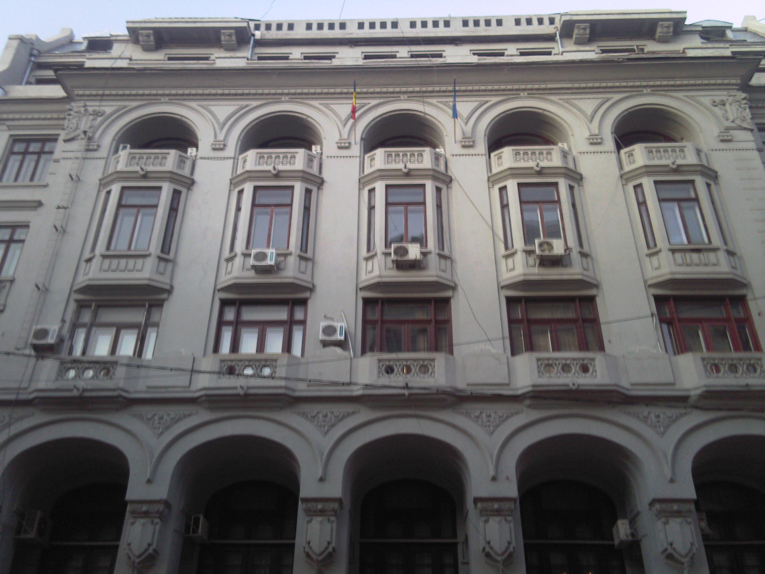 Blocul Societății Politehnice